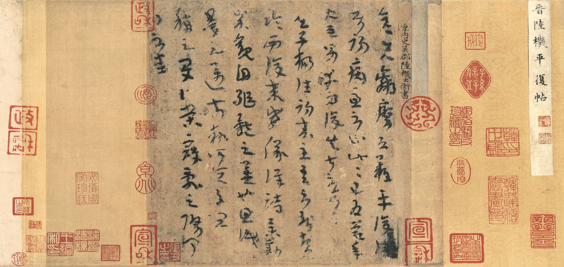 陆机《平复帖》。